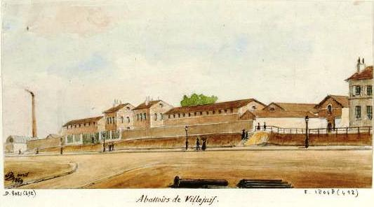 Aquarelle représentant les abattoirs de Villejuif, à Paris, au Template:S-.